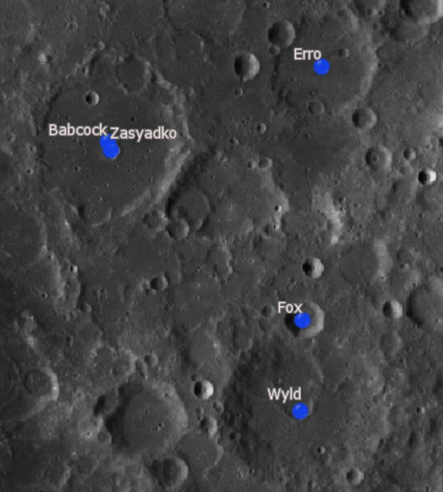 Cráter lunar Fox. Localización. (Imagen LROC)